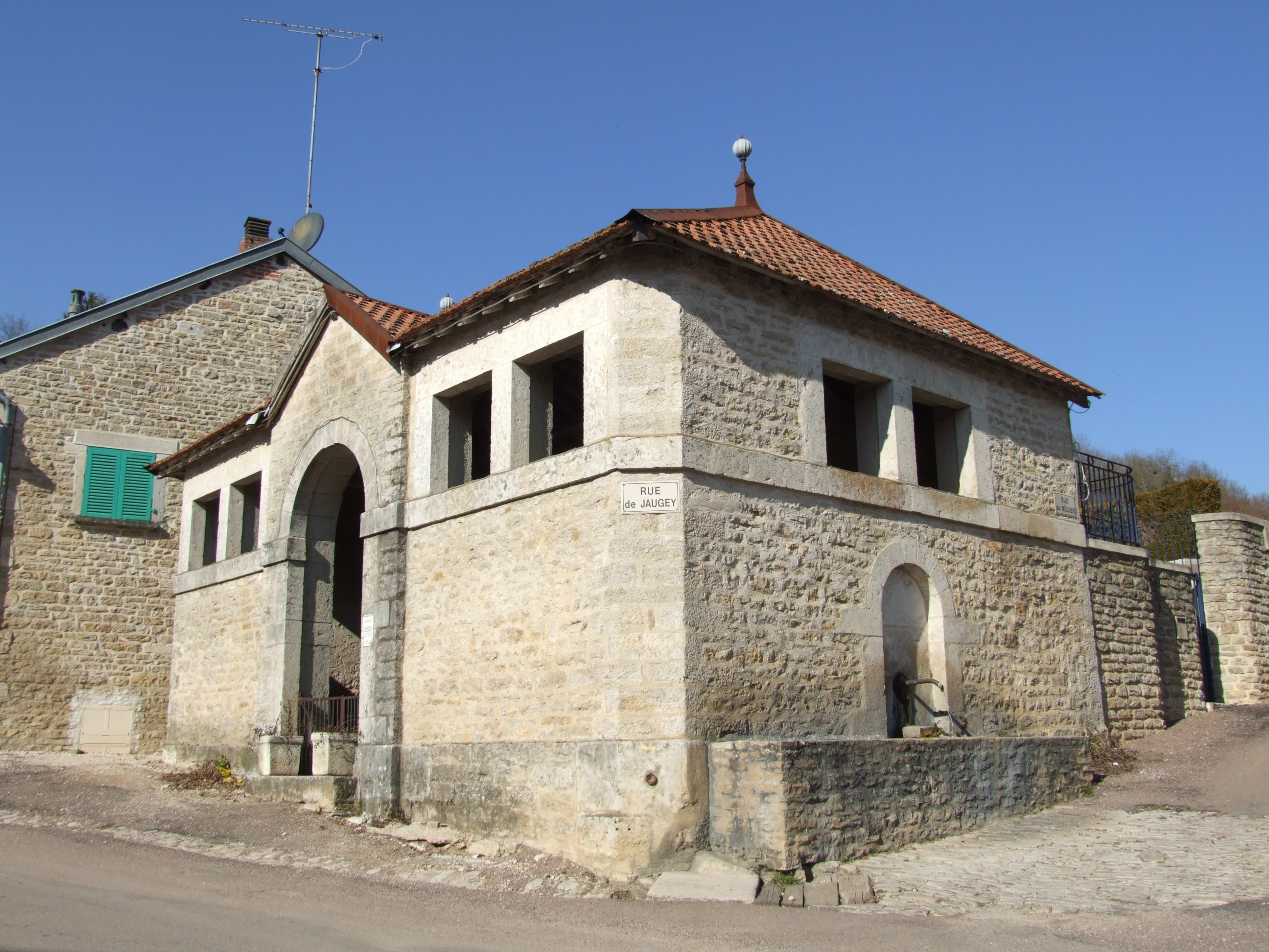 Lavoir, Barbirey-sur-Ouche, Côte-d'Or, Bourgogne, FRANCE